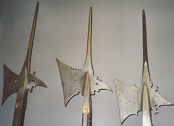 Hellebarden